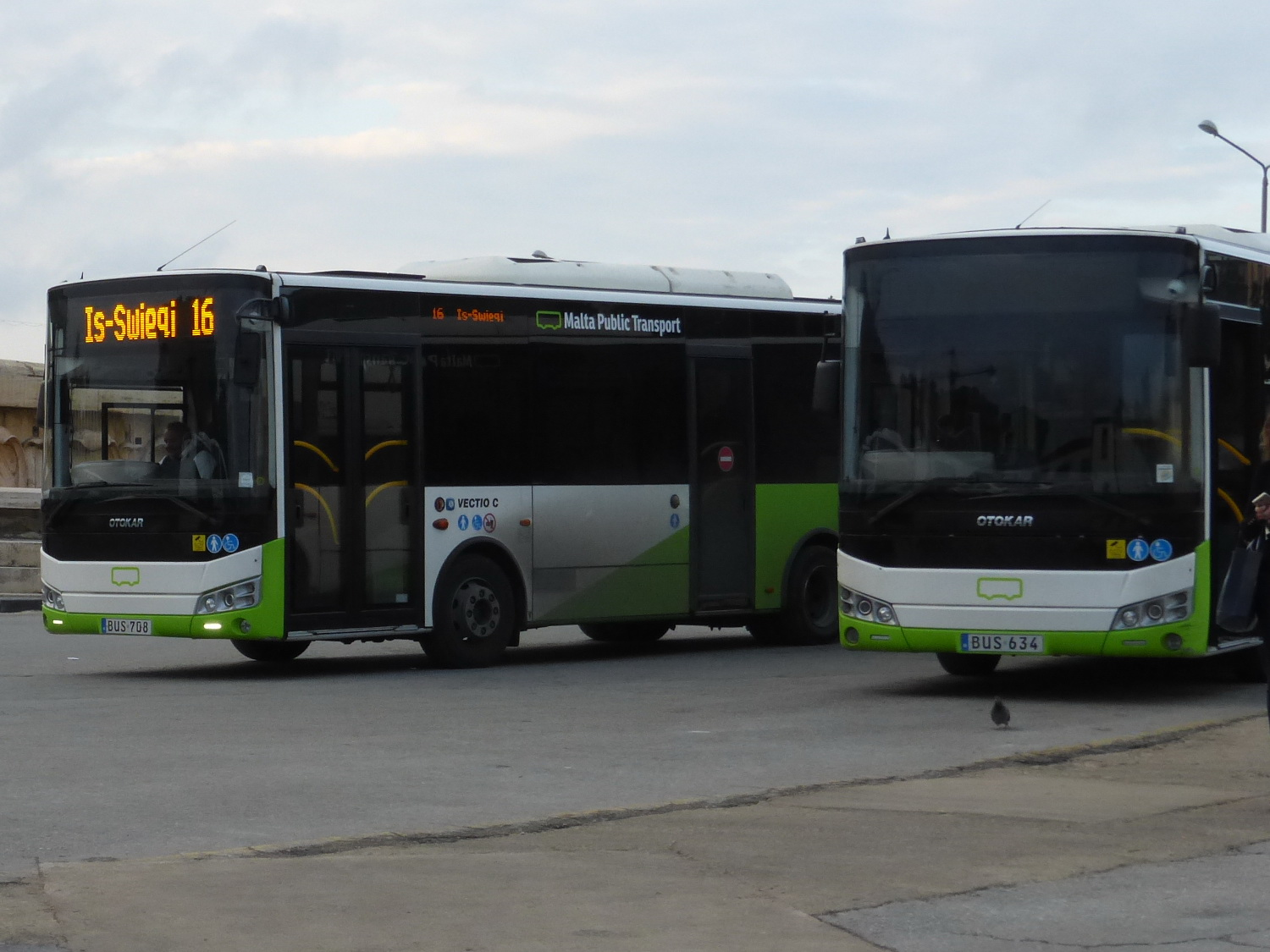 Maltesische Otokar-Linienbusse in der Lackierung von 2016